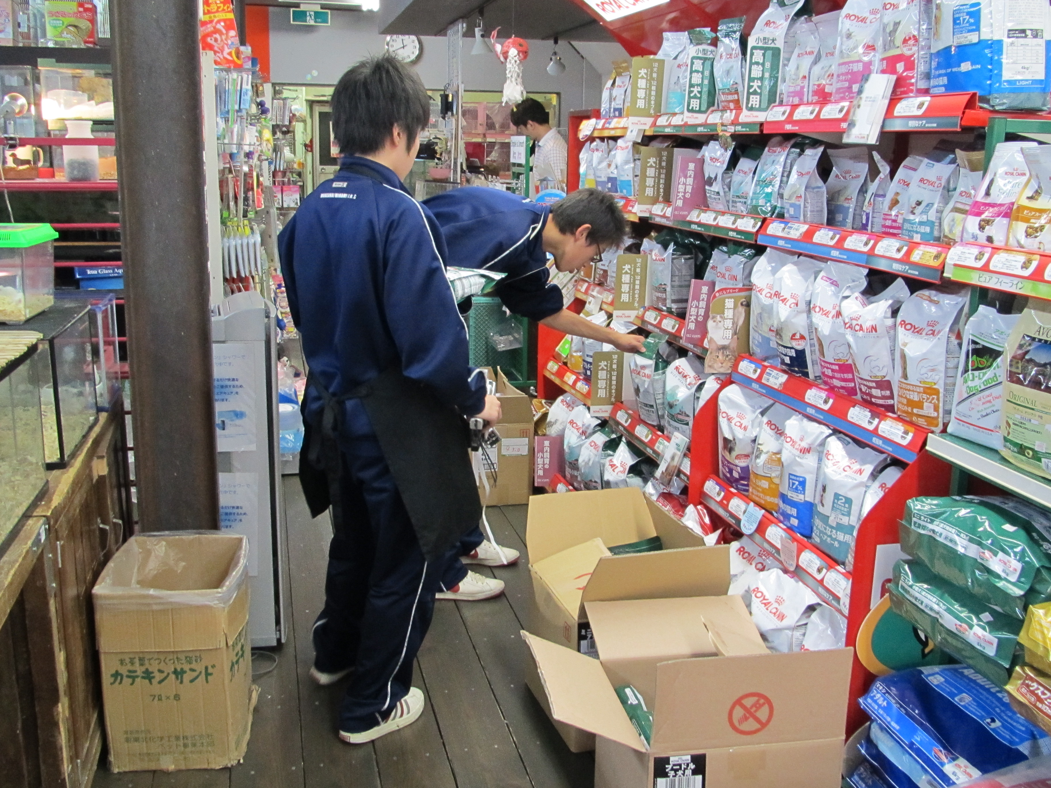 中央商店街ペットショップカナリアさんにて☆